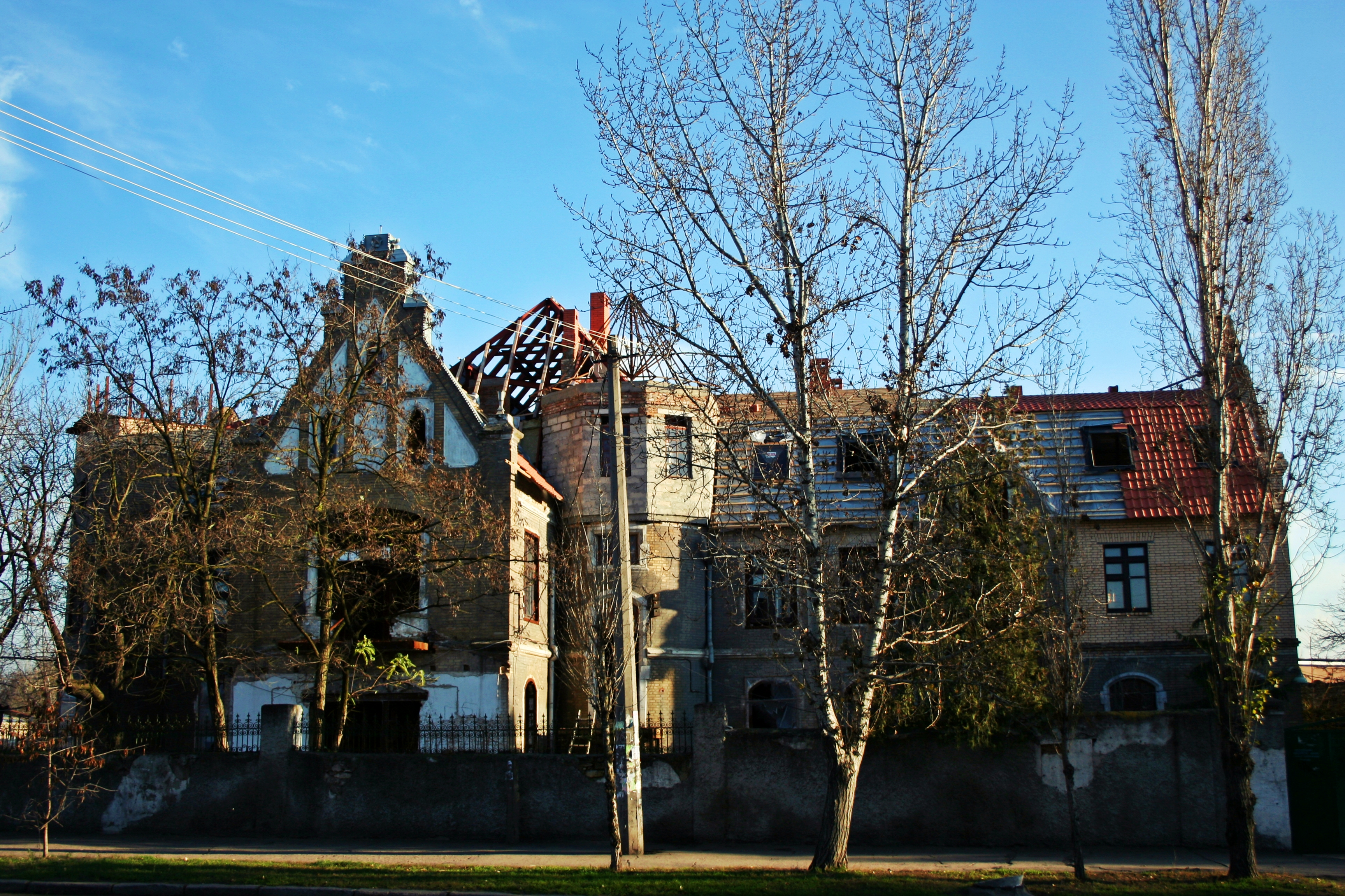 Житловий будинок-особняк, Миколаїв, вул. Рюміна, 2-а